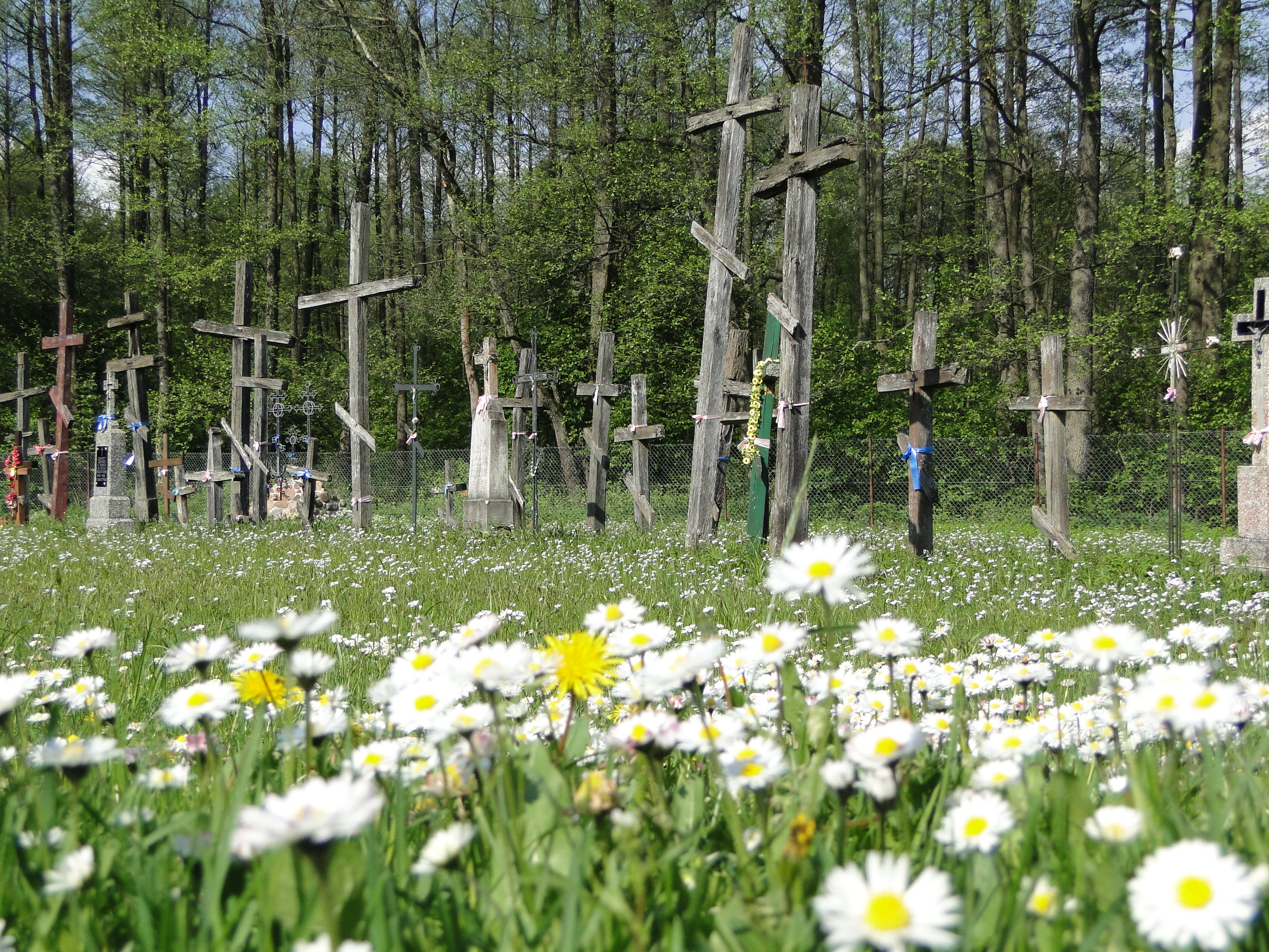 Koterka (w rejestrze: Tokary), cerkiew cmentarna prawosławna par. p.w. Matki Boskiej Wszystkich Strapionych Radość, 1912